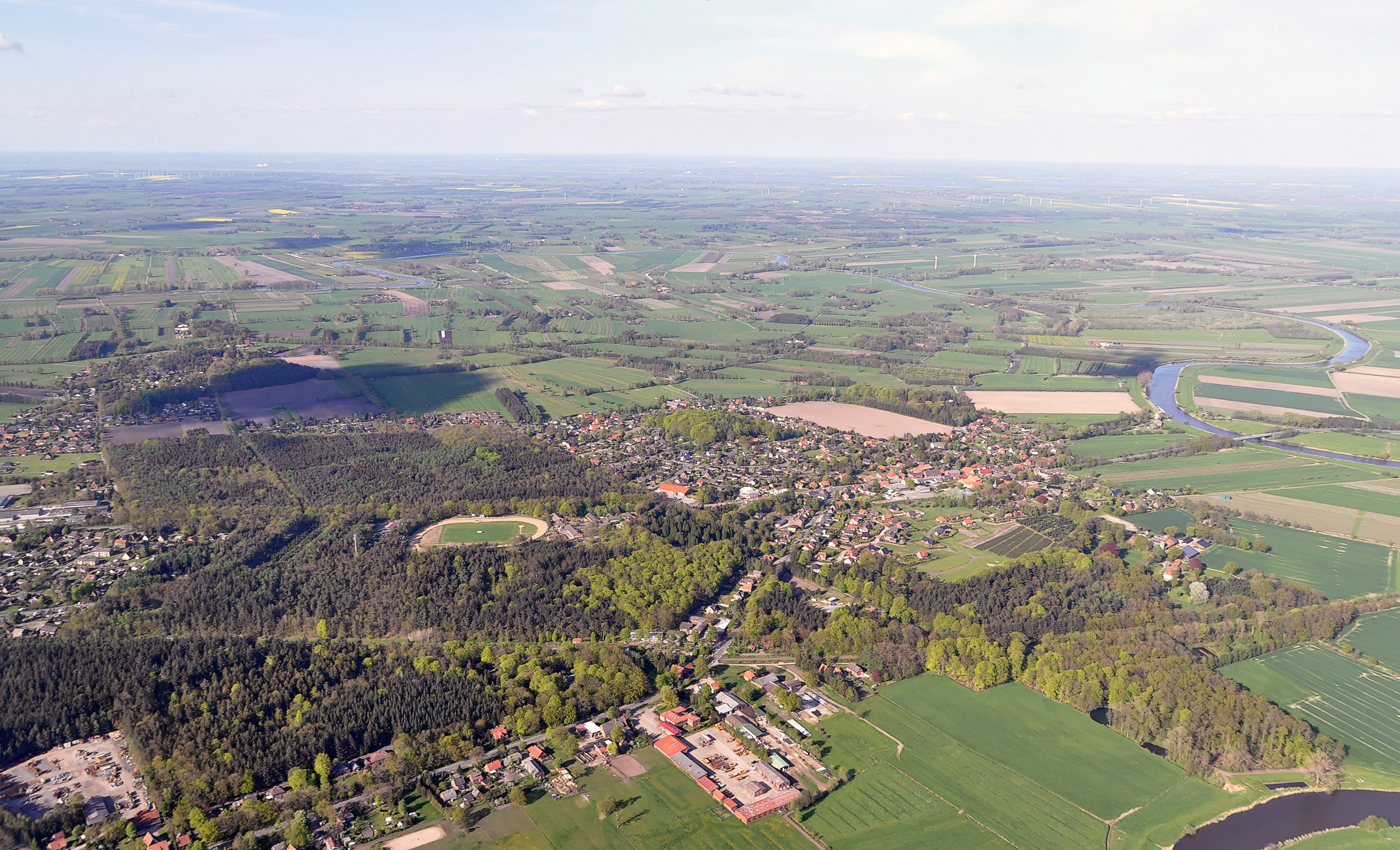 Luftbilder von der Nordseeküste 2012-05